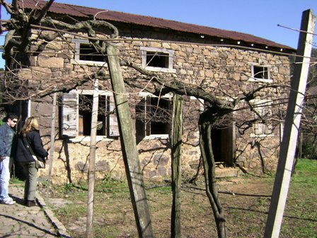 Casa de Pedra, típica dos primeiros colonizadores